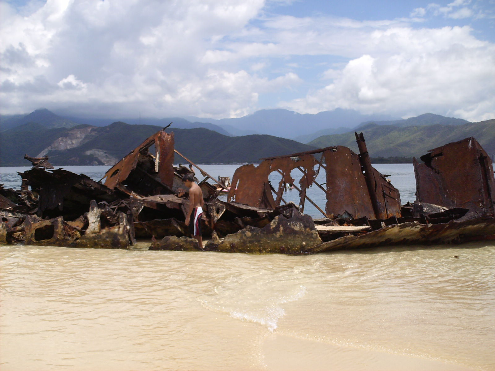 Naufragio en Isla Larga, Parque nacional San Esteban, Carabobo, Venezuela